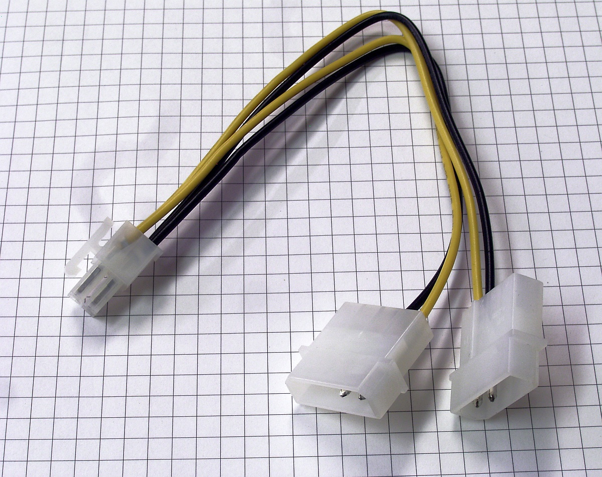 Adapterkabel, um Hauptplatinen nach neueren ATX-Standards mit älteren Netzteilen ohne den "P4"-Stecker betreiben zu können